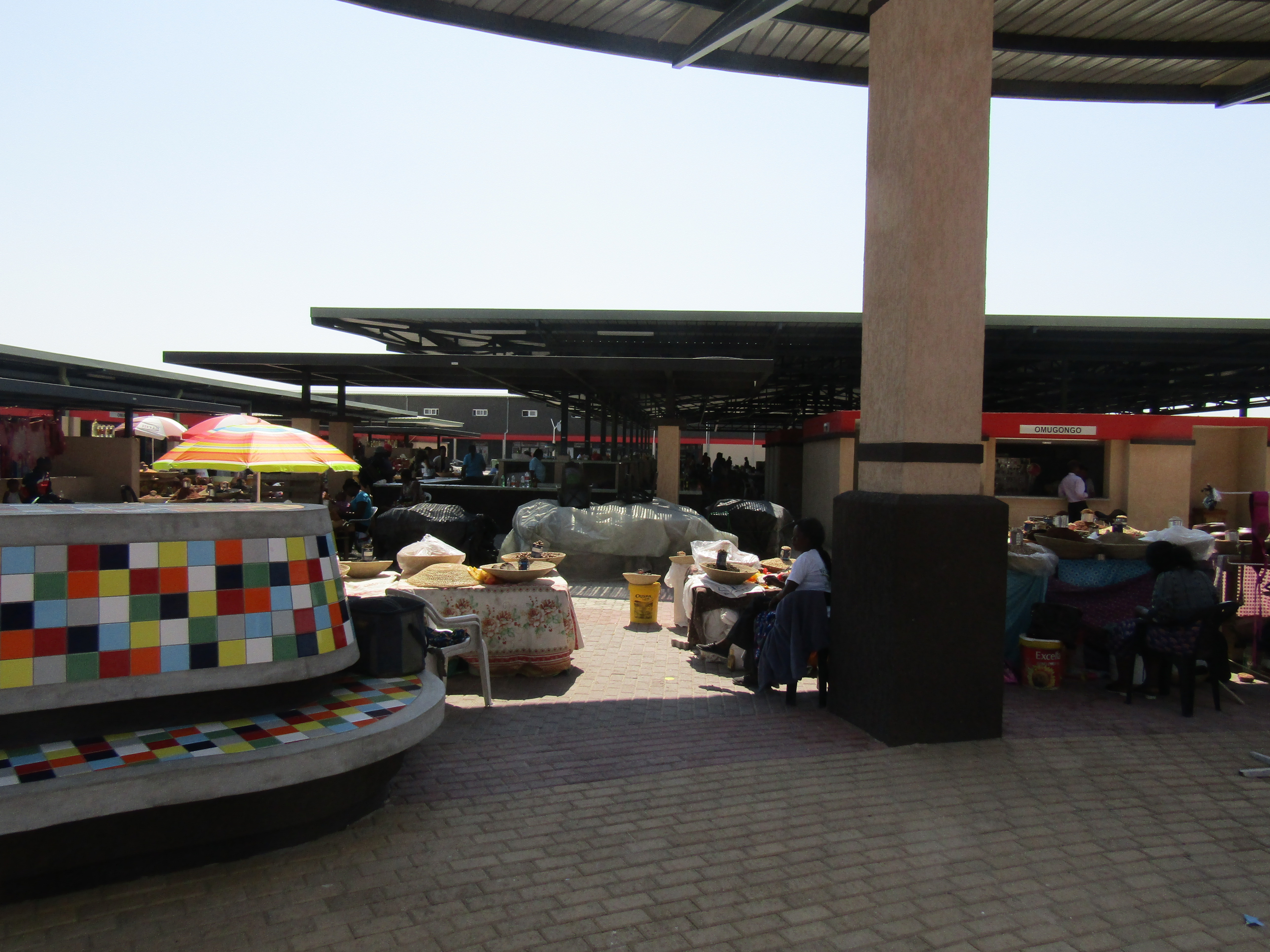 Dr. Frans Aupa Indongo Open Market in Oshakati, am 11.3.2016 eroeffnet